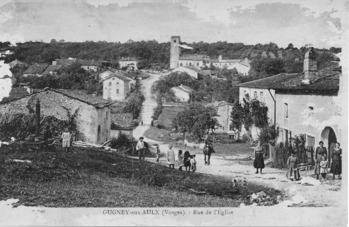 Gugney-aux-Aulx - Carte postale ancienne - Rue de l'église vue depuis le haut de la rue Berthon. Derrière l'église les vergers de mirabelliers ont remplacé les vignes arrachées en 1905 après l'attaque du phylloxéra à la fin du siècle précédent